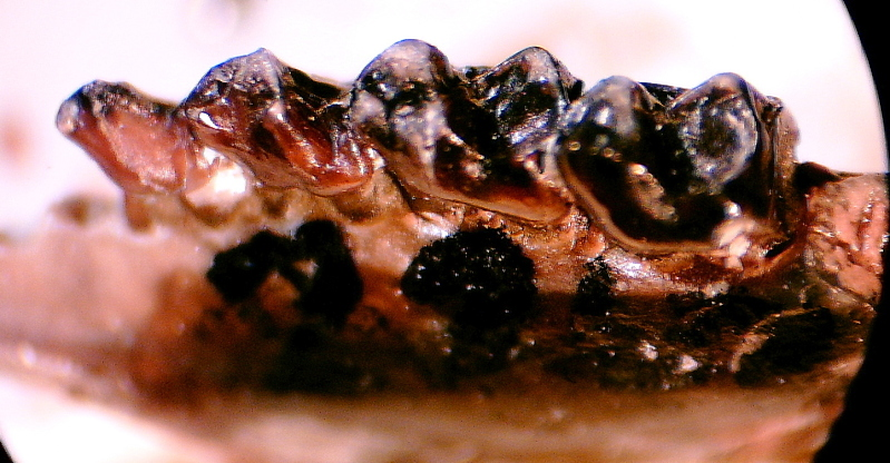 Tetonoides pearcei Gazin, 1962